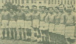 İstanbulspor ile oynanan maç öncesinde Galatasaray oyuncuları, 12 Ekim 1934.